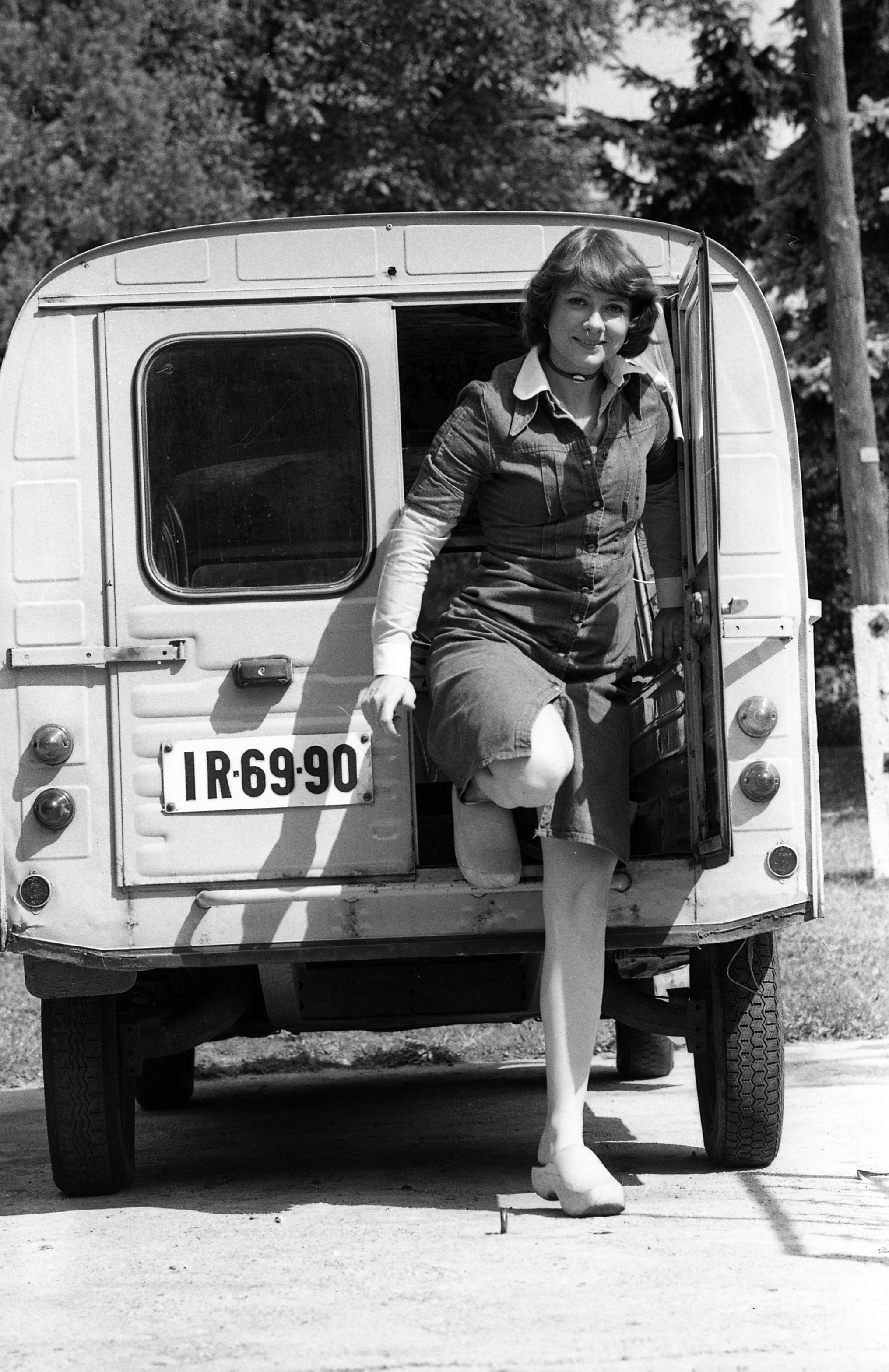 Katona Klári énekesnő. Location: Hungary Tags: Citroën-brand, French brand, number plate Title: Katona Klári énekesnő.